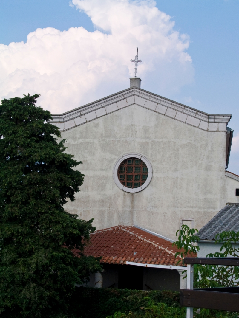 Crkva u Dobrinju na otoku Krku